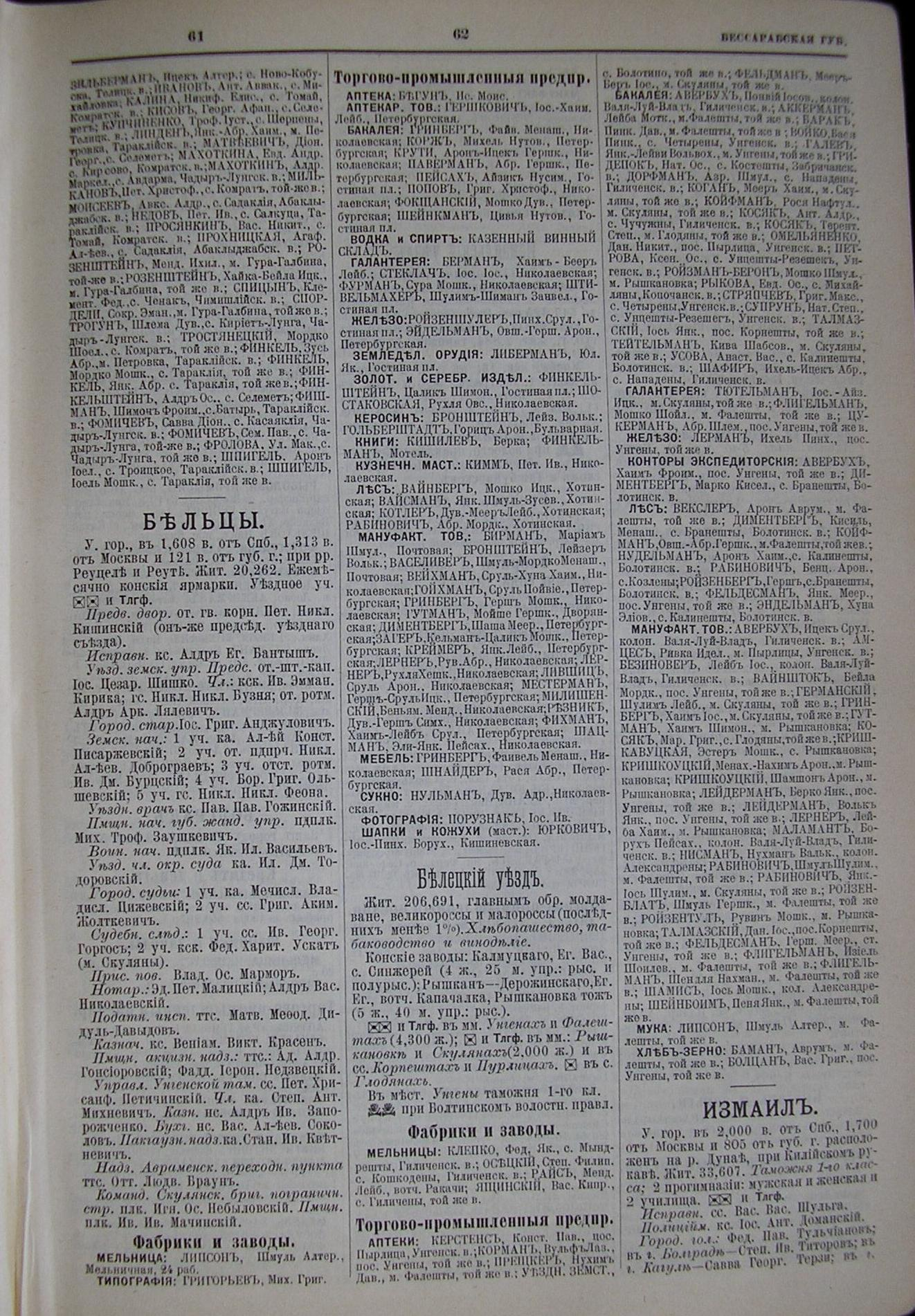 Стр. 61-63 (Бельцы и Бельцкий уезд) из адрес-календаря Российской империи "Вся Россия", 1902.